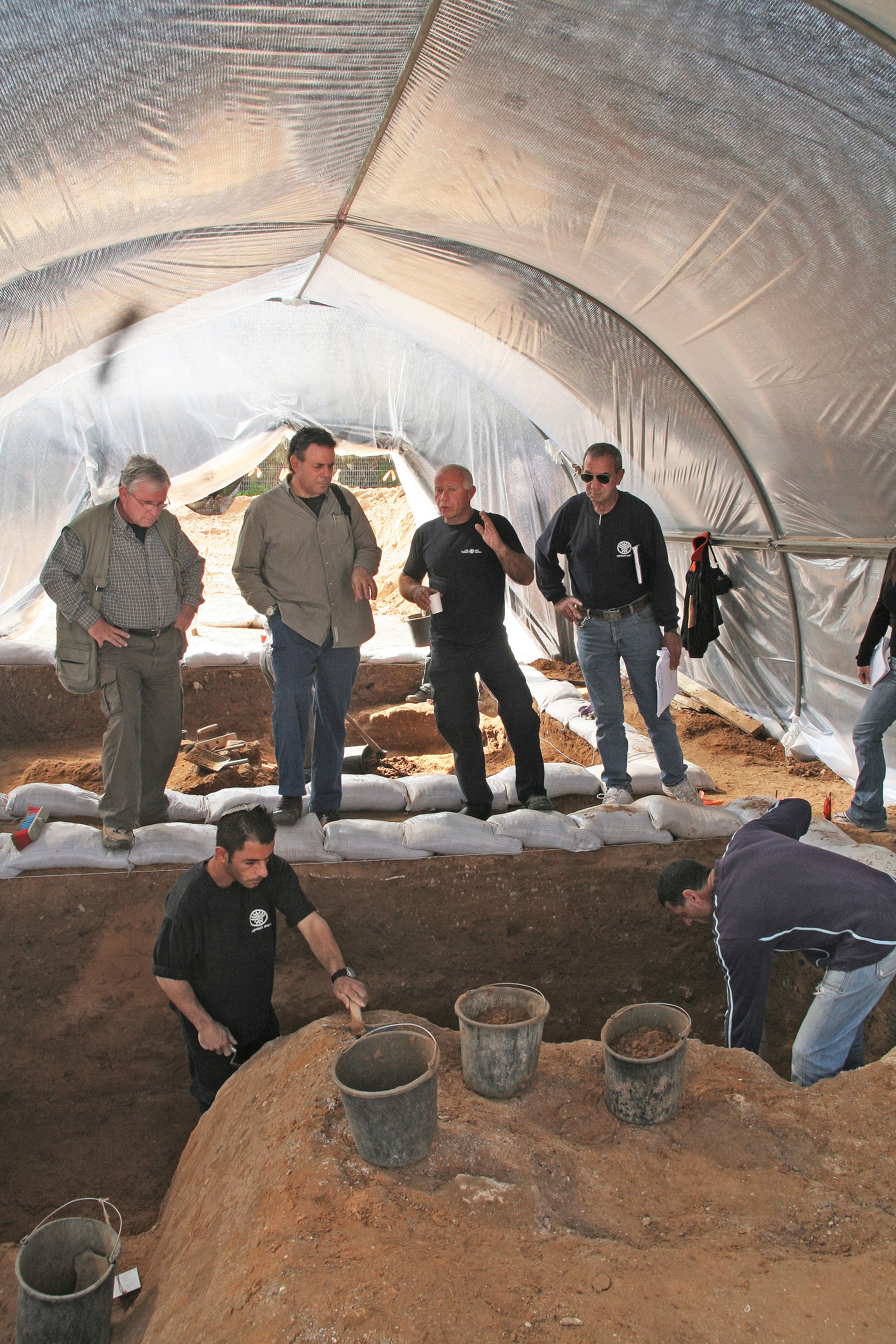 חפירה ארכאולוגית באשקלון. מצולמים מימין לשמאל: ארכאולוג נפת אשקלון דאז יעקב הוסטר, ארכאולוג מרחב דרום ד"ר יגאל ישראל, מנהל רשות העתיקות שוקה דורפמן, הארכאולוג יעקב באומגרטן.